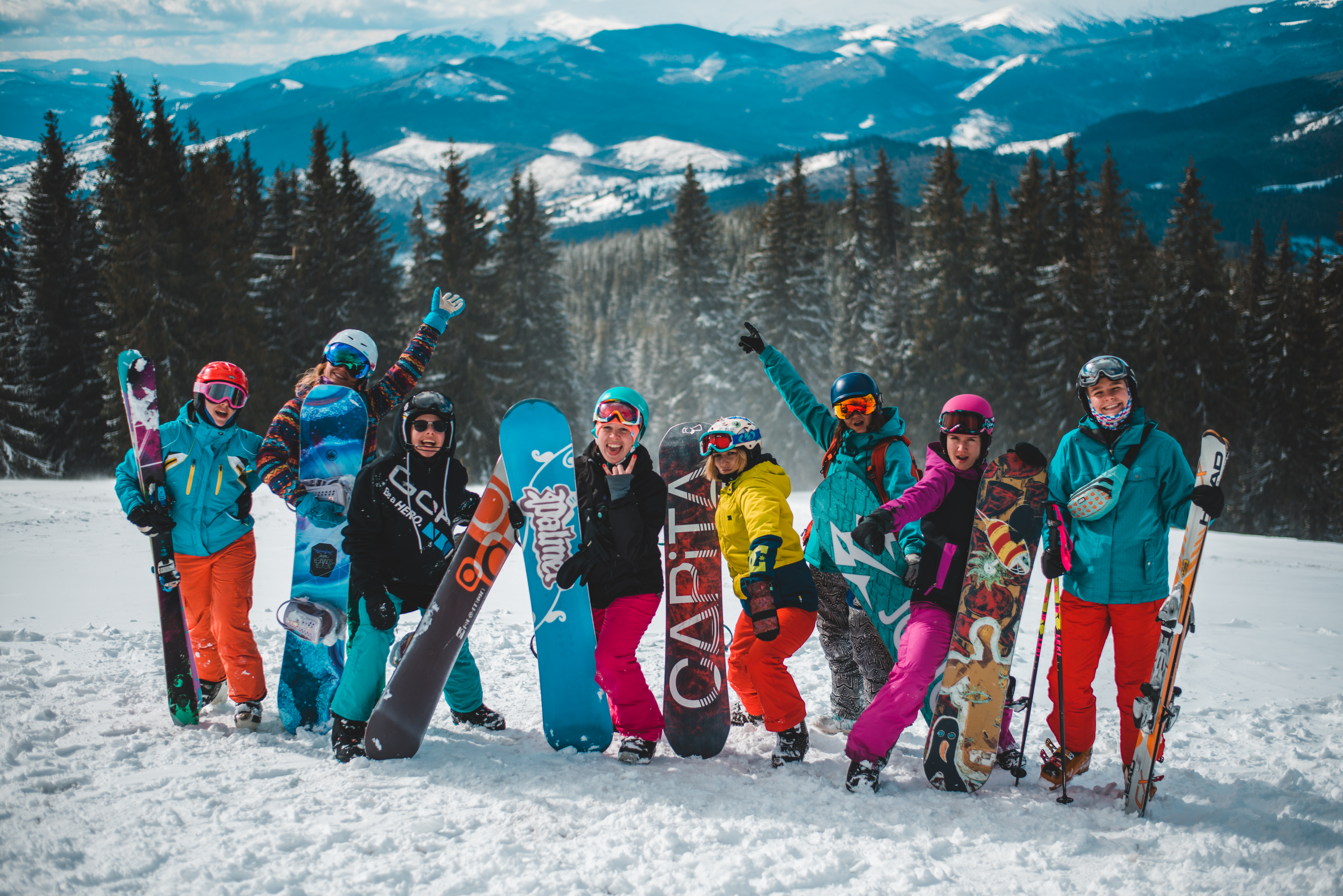 Бунтарки на Лещетариках 2019.